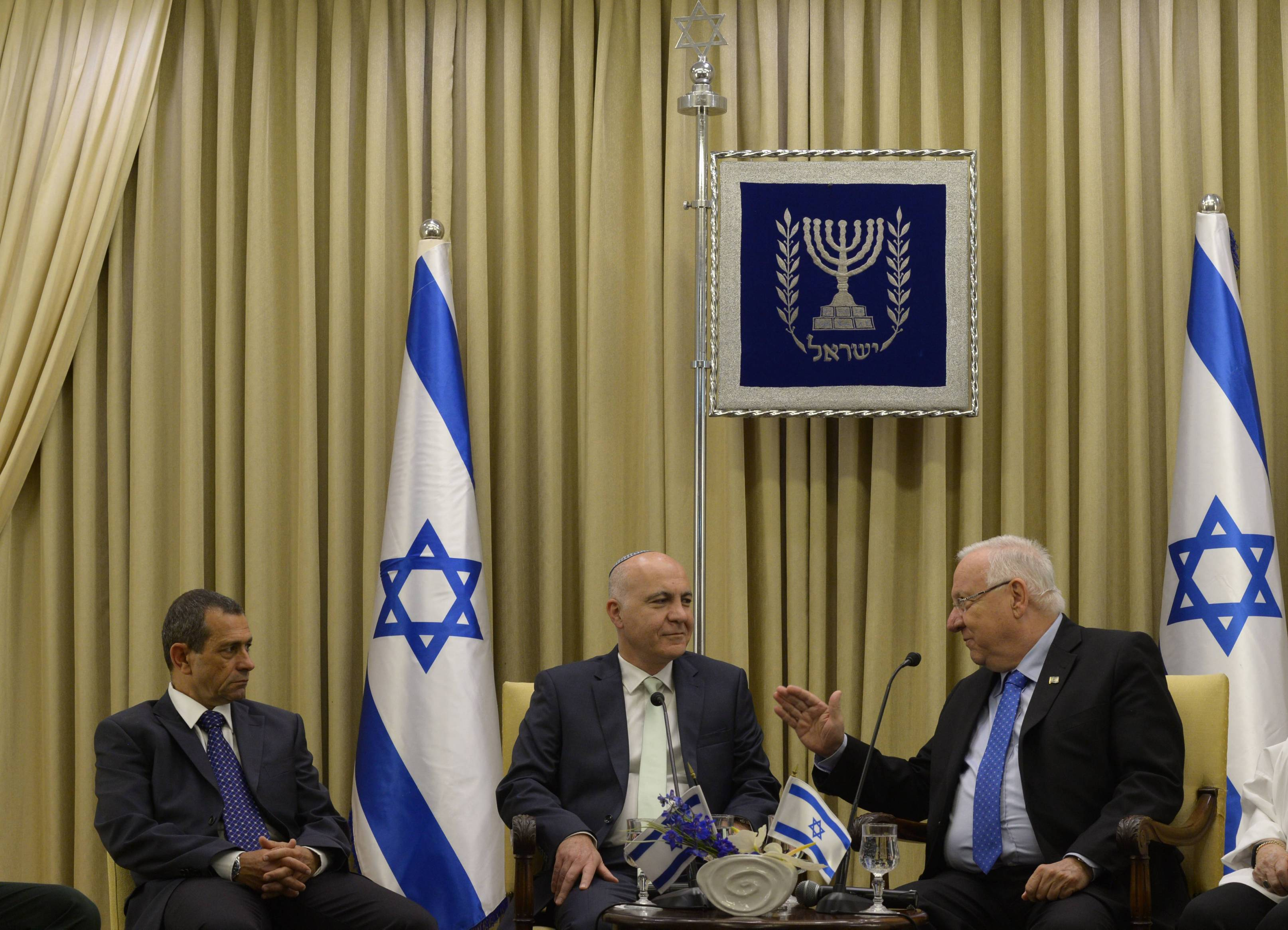 נשיא מדינת ישראל ראובן ריבלין מארח את ראש השב"כ היוצא יורם כהן במרכז ואת ראש השב"כ החדש נדב ארגמן משמאל